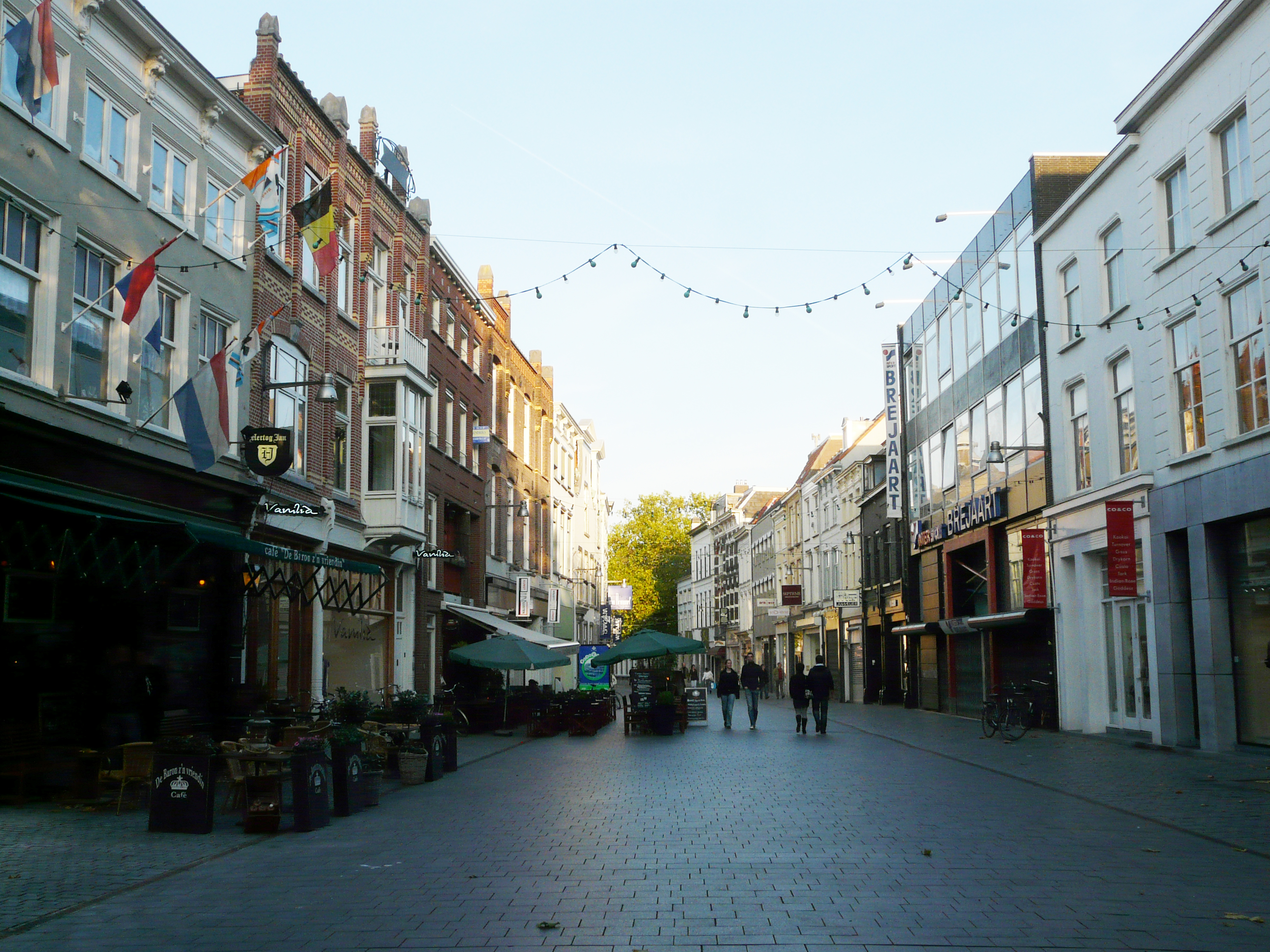 Zicht op een deel van de winkelstraat de Veemarktstraat, Breda in Breda Centrum